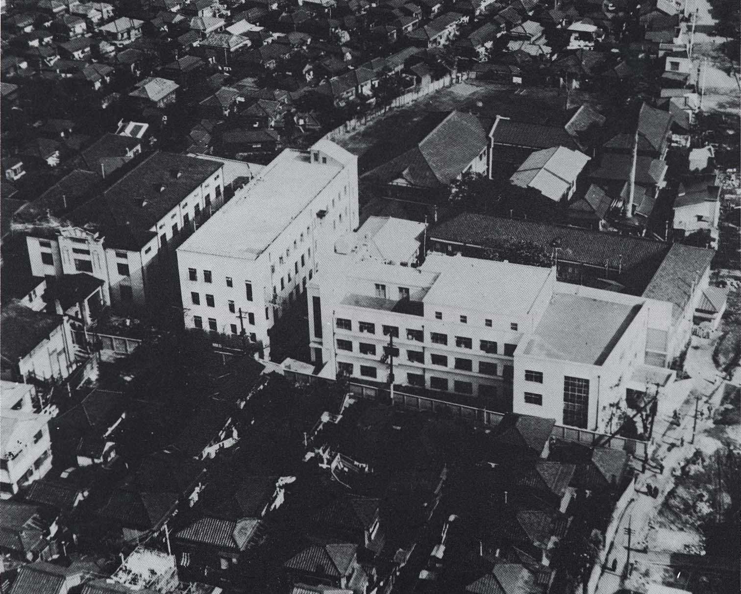 日本医科大学全景